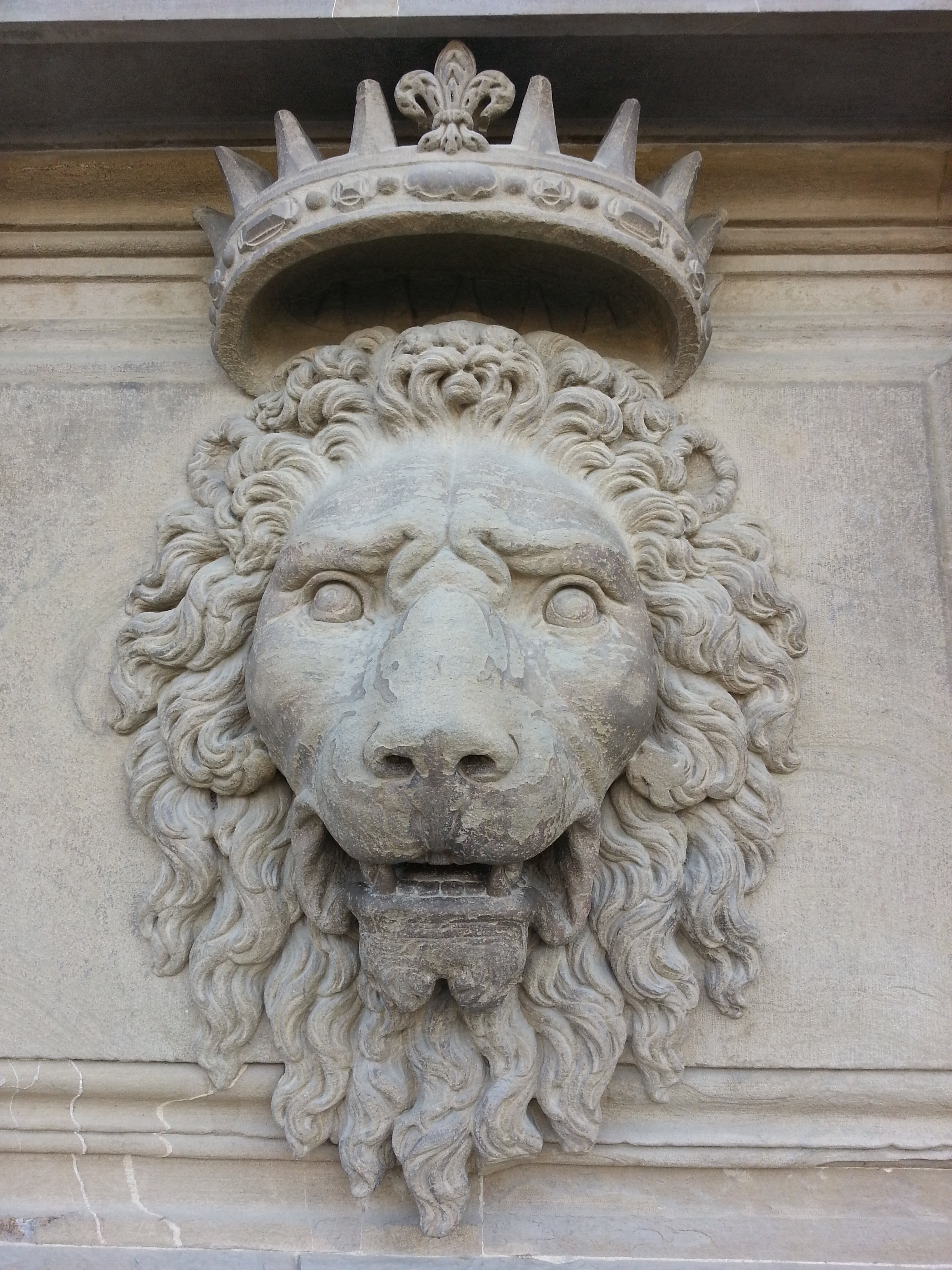 Testa leonina coronata medicea in pietraforte sulla facciata di Palazzo Pitti